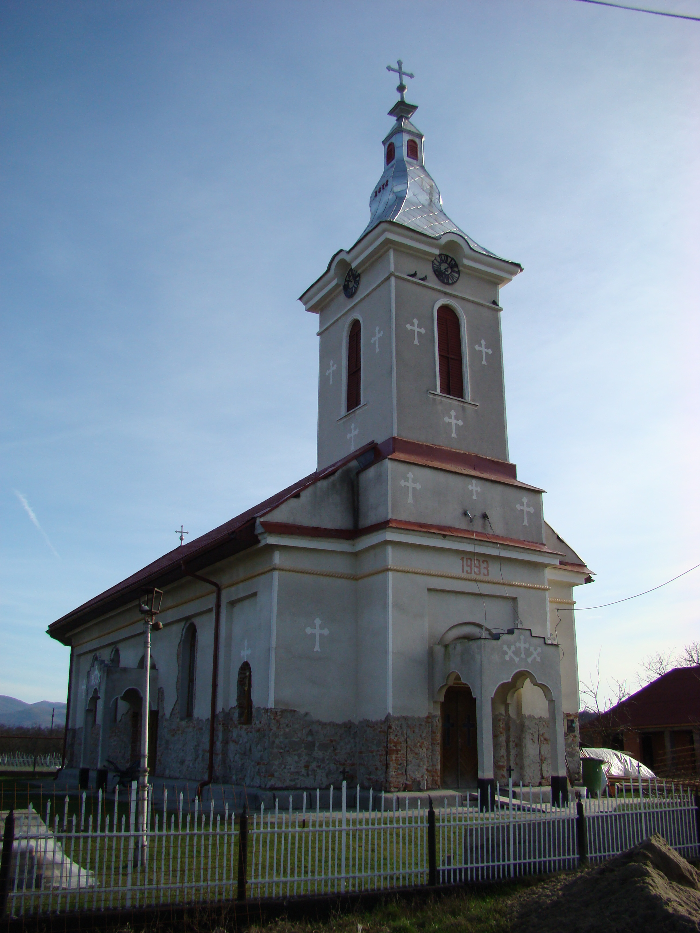 Biserica ortodoxă din Cil, județul Arad